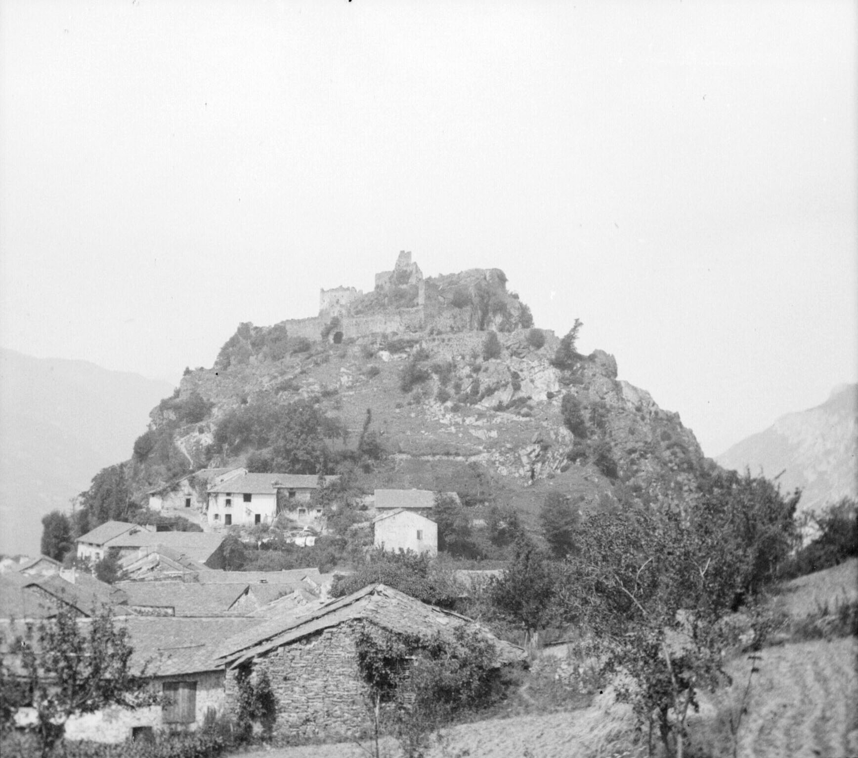 Cropped from :Image:Château de Lordat, Ariège, 1901.jpg Fonds Trutat - Photographie ancienne Cote : TRU C 430 Localisation : Fonds ancien Original non communicable Titre : Château de Lordat, Ariège, 1901 Auteur : Trutat, Eugène Rôle de l’auteur : Photographe Lieu de création : Lordat (Ariège) Date de création : : 1901 Mesures : 11 x 5 cm Mot(s)-clé(s) : -- Montagne -- Château -- Végétation -- Bâtiment -- Maison -- Ariège (Midi-Pyrénées) -- Château (Lordat) -- Lordat (Ariège) -- Ariège (France ; haute vallée) -- Pyrénées (France) -- 20e siècle, 1e quart Médium : Photographies Médium : Positifs sur plaque de verre -- Noir et blanc -- Stéréogrammes -- Paysages Bibliothèque de Toulouse. Domaine public